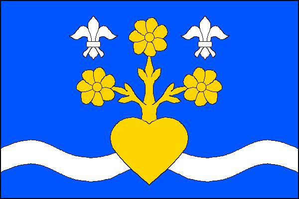 Vlajka obce Milotice nad Opavou